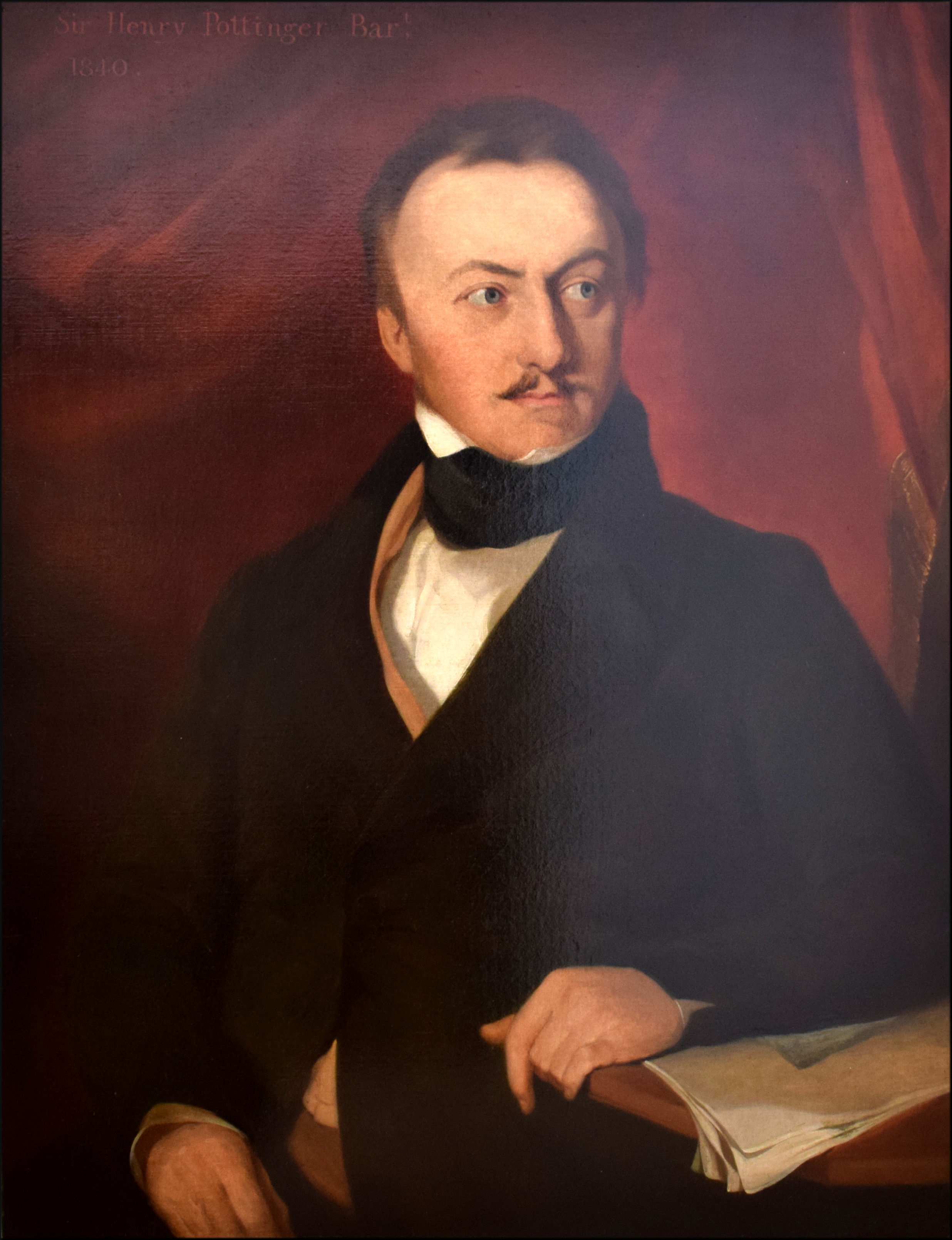 Sir Henry Pottinger, 1st Baronet